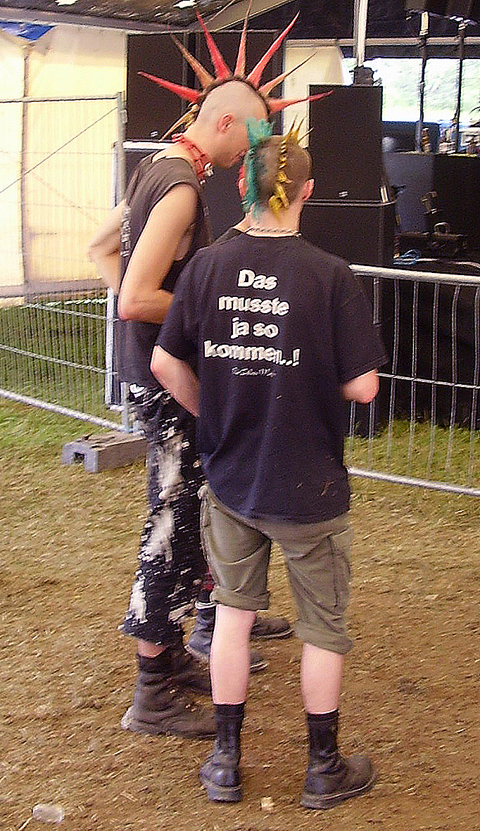 punx @ festival